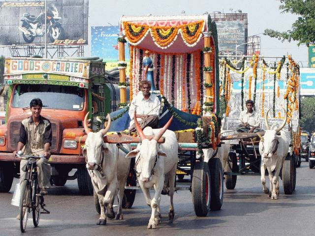 Mumbai traffic